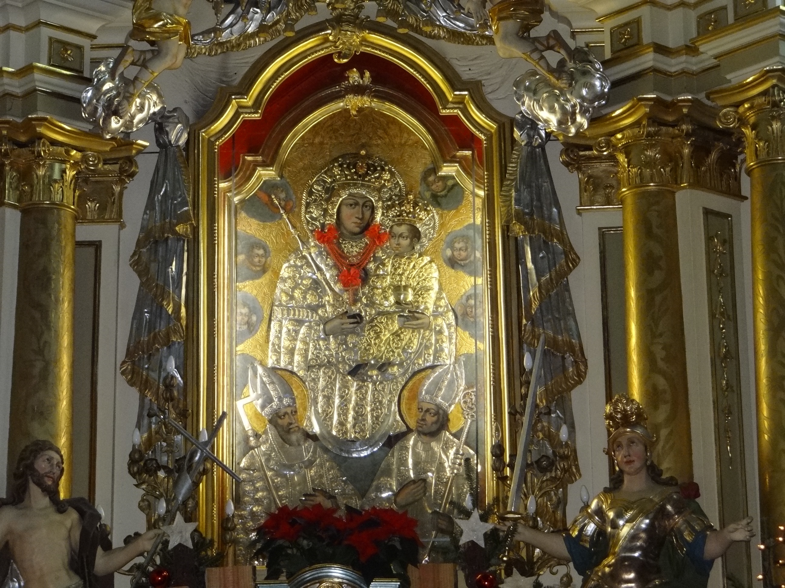 Matka Boska Odporyszowska